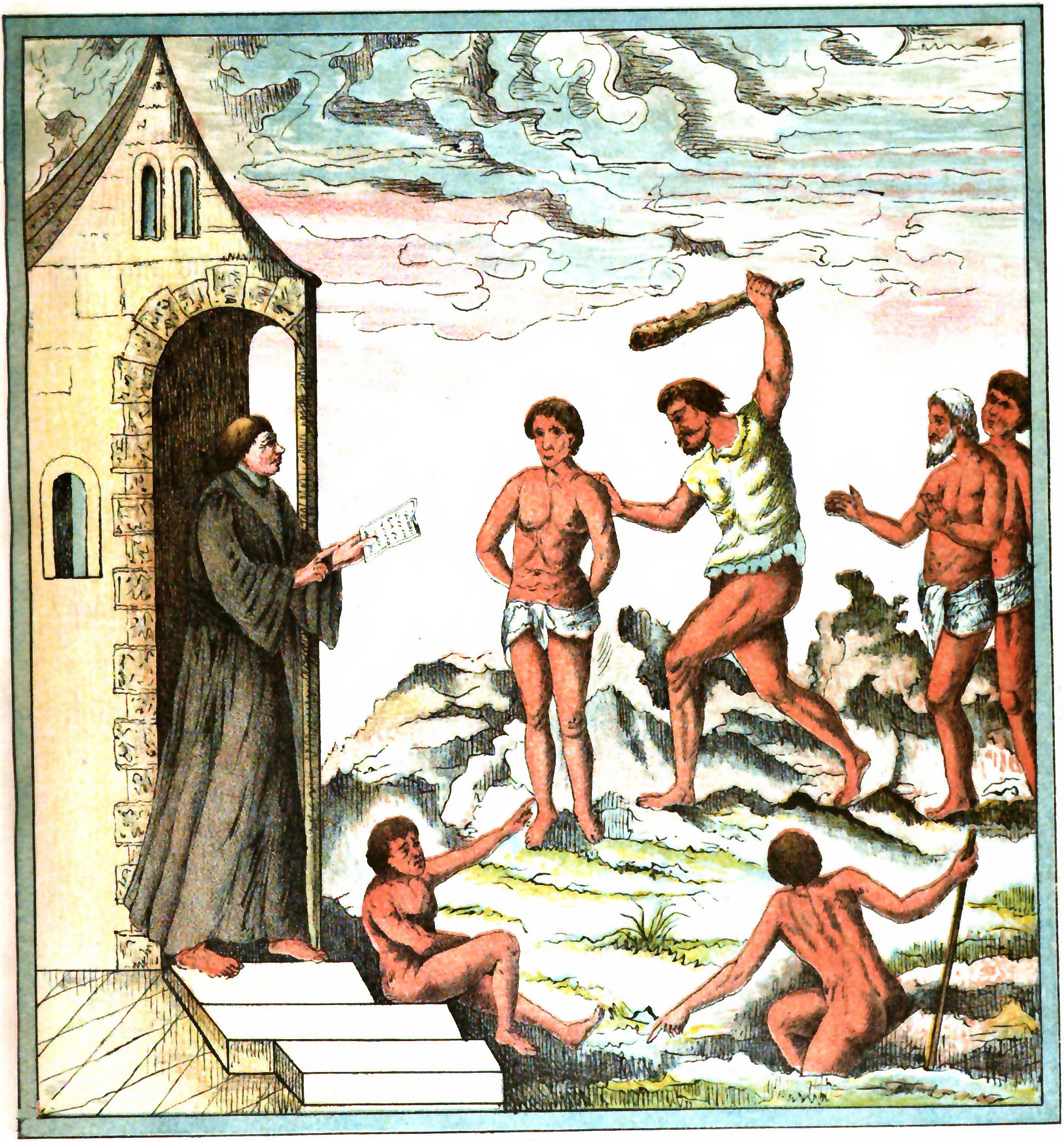 Moeurs des Indiens tel que décrites par Champlain dans ses mémoires de voyage dans le golfe du Mexique. «L'ordre dont ils usent maintenant est que en chacun estance qui sont comme vilages, il y a vng prestre qui les instruict ordinerement, ayant le prestre vng rolle de noms & surnoms de tous les Indiens qui habitent au village soubs sa charge. Il y a aussy vng Indien qui est comme procureur du village, qui a vng autre pareil rolle, & le dimanche, quand le prestre veult dire la messe, tous lesdicts Indiens sont teneus se presenter pour l'ouir, & auant que le prestre la commence, il prend son rolle, & les appelle tous par leur nom & surnom, & sy quelqu'vn deffault, il est marqué sur ledict rolle; puis la messe dite, le prestre donne charge à l'Indien qui sert de procureur de s'informer particullierement où sont les defaillans, & qui les face reuenir à l'église, où estant deuant ledict prestre, il leur de mande l'occasion pour lequel ils ne sont pas veneus au seruice diuin, dont ils alleguent quelques excuses s'ils peuuent en trouuer, & fy elles ne sont trouués veritables ou raisonnables, ledict prestre commande audict procureur Indien qui aye à donner hors l’eglise, deuant tout le peuple, trente ou quarante coups de baston aux defaillants. Voilla l'ordre que l'on tien à les maintenir en la religion, en laquelle ils viuent partye pour crainte d'estre battus : il est bien vray que s'ils ont quelque iuste occasion qui les empesche de venir à la messe, ils sont excusés.» Tiré du BRIEF DISCOVRS DES CHOSES PLVS REMARQVABLES QVE SAMMVEL CHAMPLAIN DE BROVAGE A reconneues aux Indes Occidentalles Au voiage qu'il en a faict en icelles en l'année 1599 et en l'année 1601.